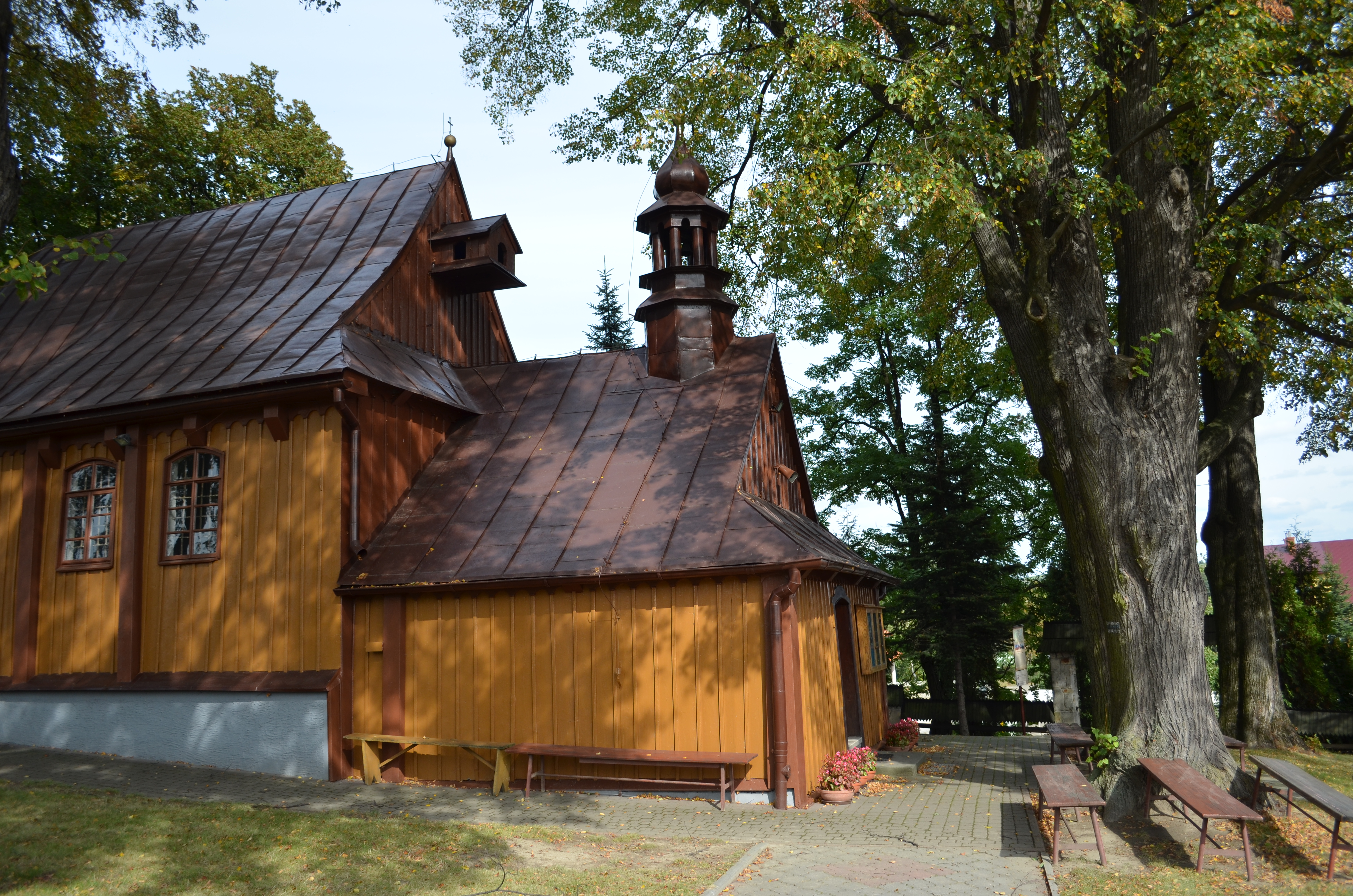 Tęgoborze. Zespół kościoła fil. p.w. NPM, XVIII.